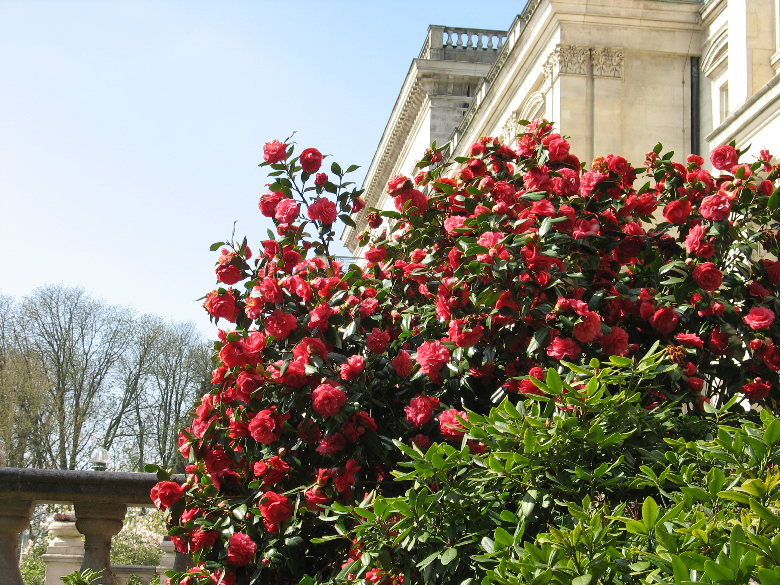 Südfront Villa Hügel Essen